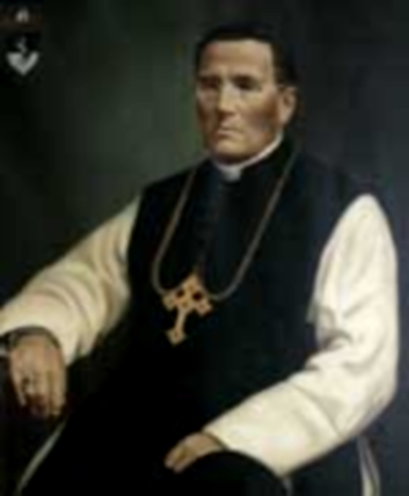 Dominikus Willi, OCist. 1844-1913, Bischof von Limburg (1898-1913)